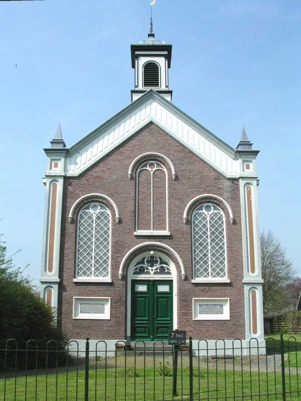 Eén van de kerken in Twisk One of the churches in Twisk